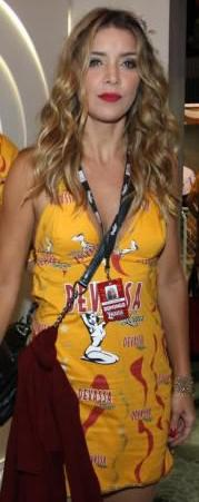 O casal de atores Floriano Peixoto e Christine Fernandes chega a um dos camarotes do Carnaval do Rio de Janeiro.